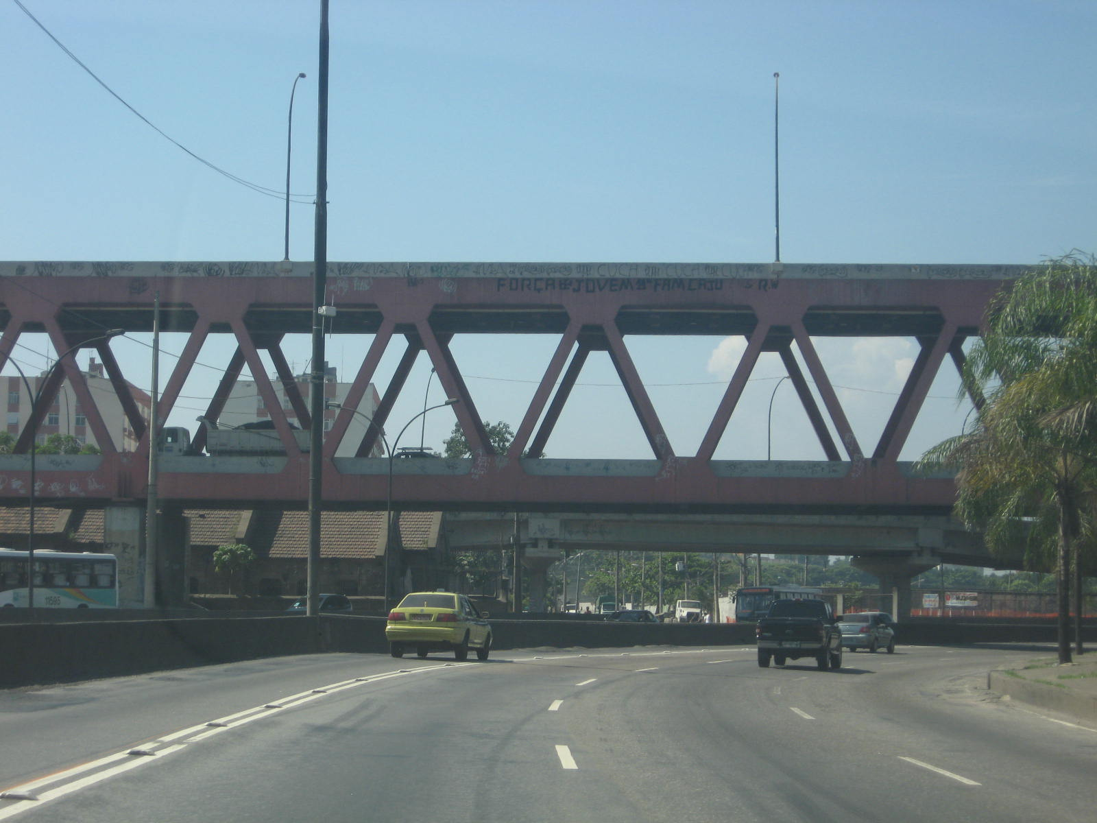 Linha Vermelha, localizada na cidade do Rio de Janeiro.